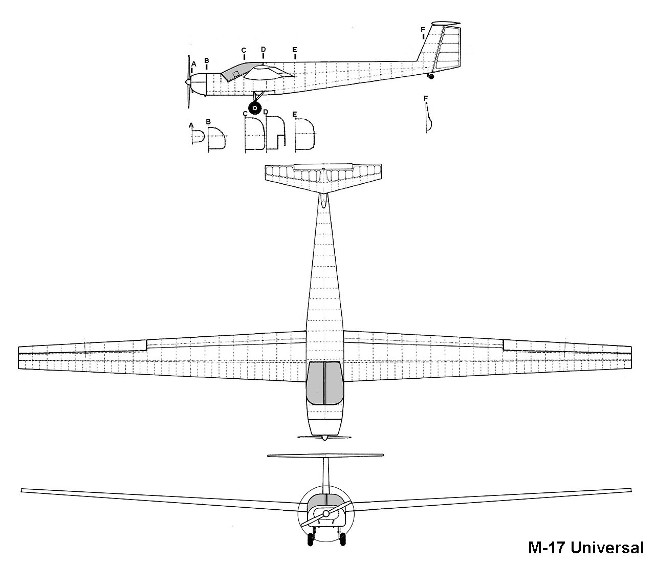 Matejicek M-17 Universal, skica